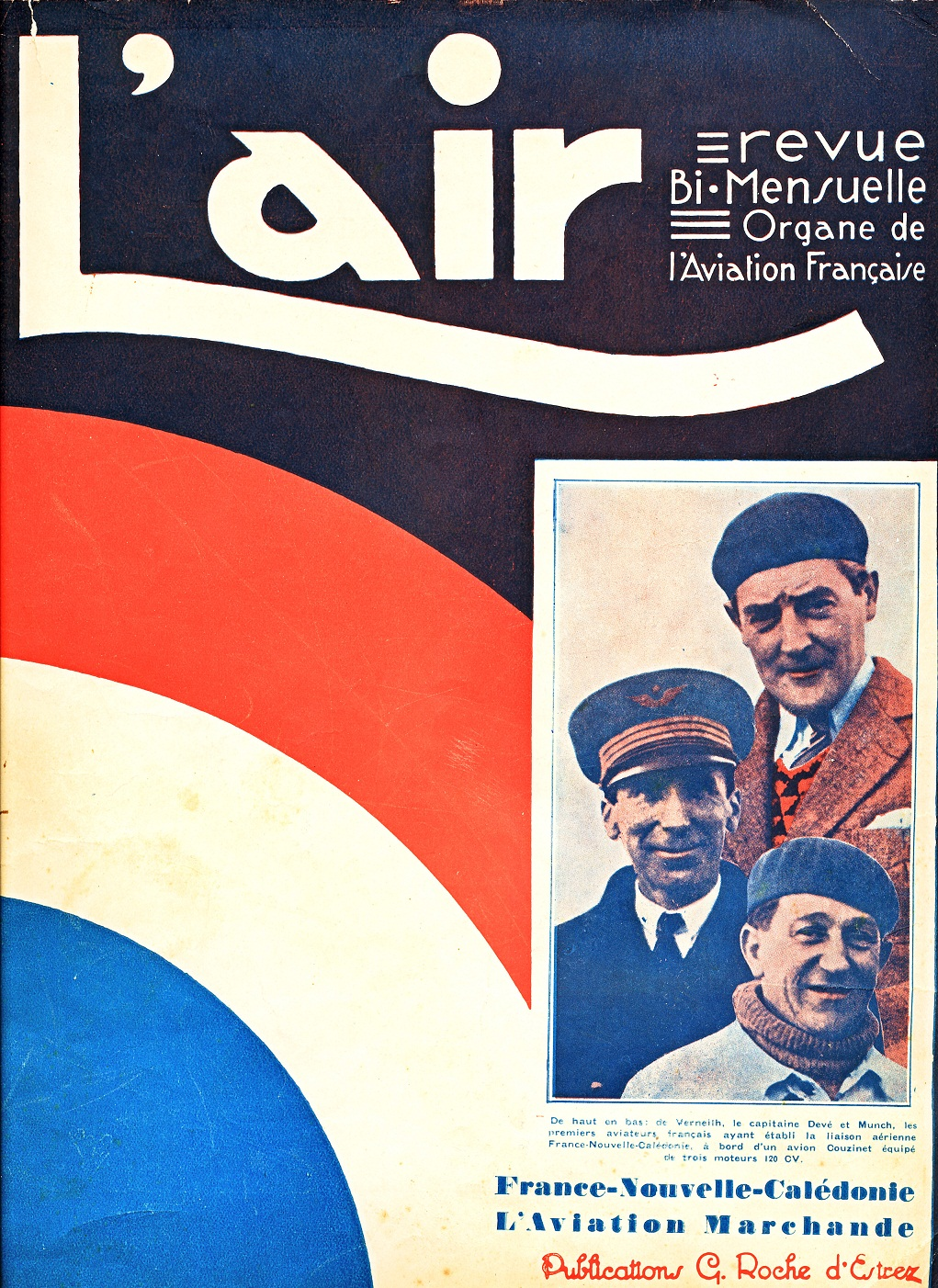 L'AIR Couverture 15avril 1932